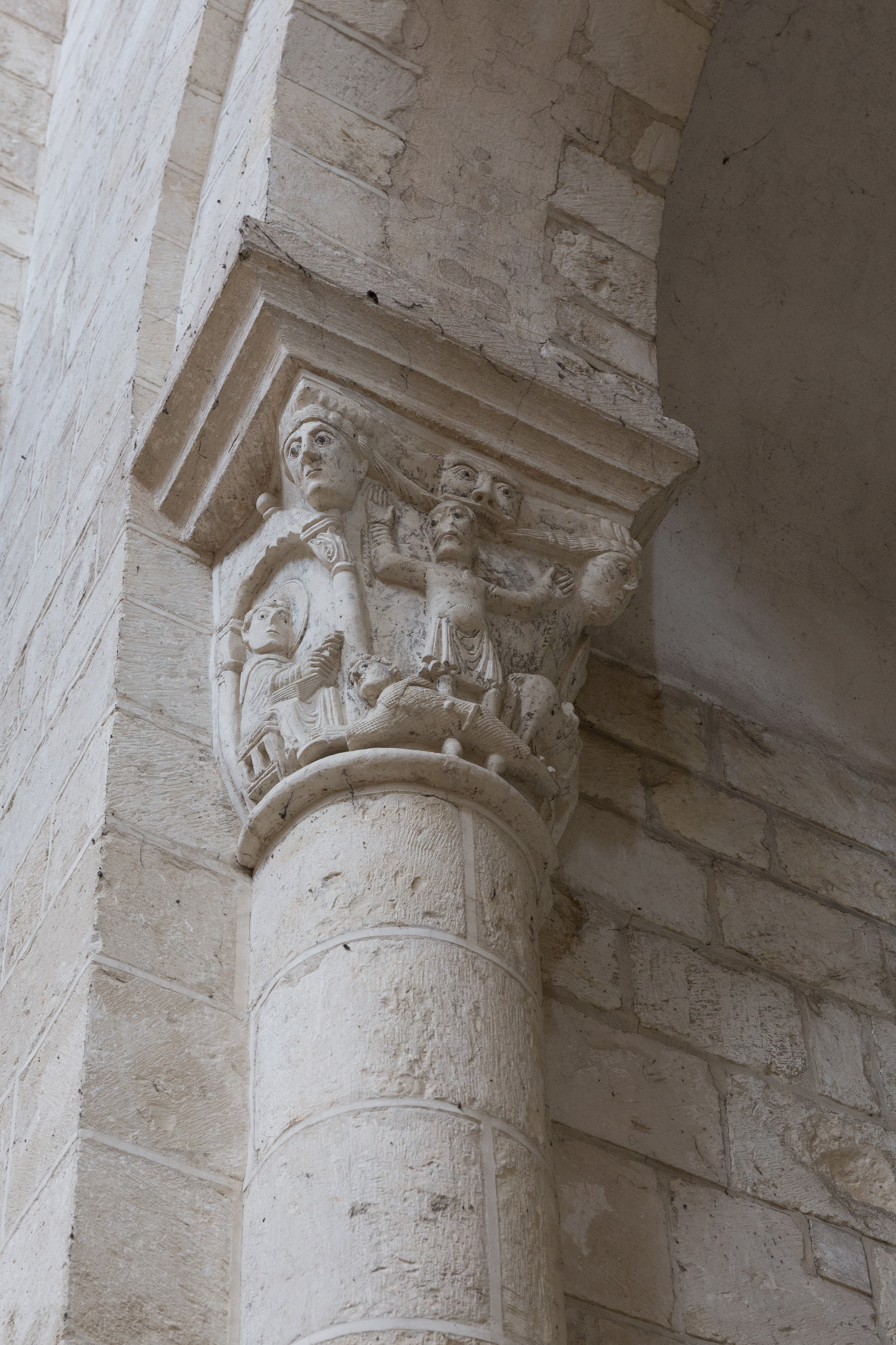 Chapiteau du transept nord de l'abbatiale Saint-Benoît de Saint-Benoît-sur-Loire. .